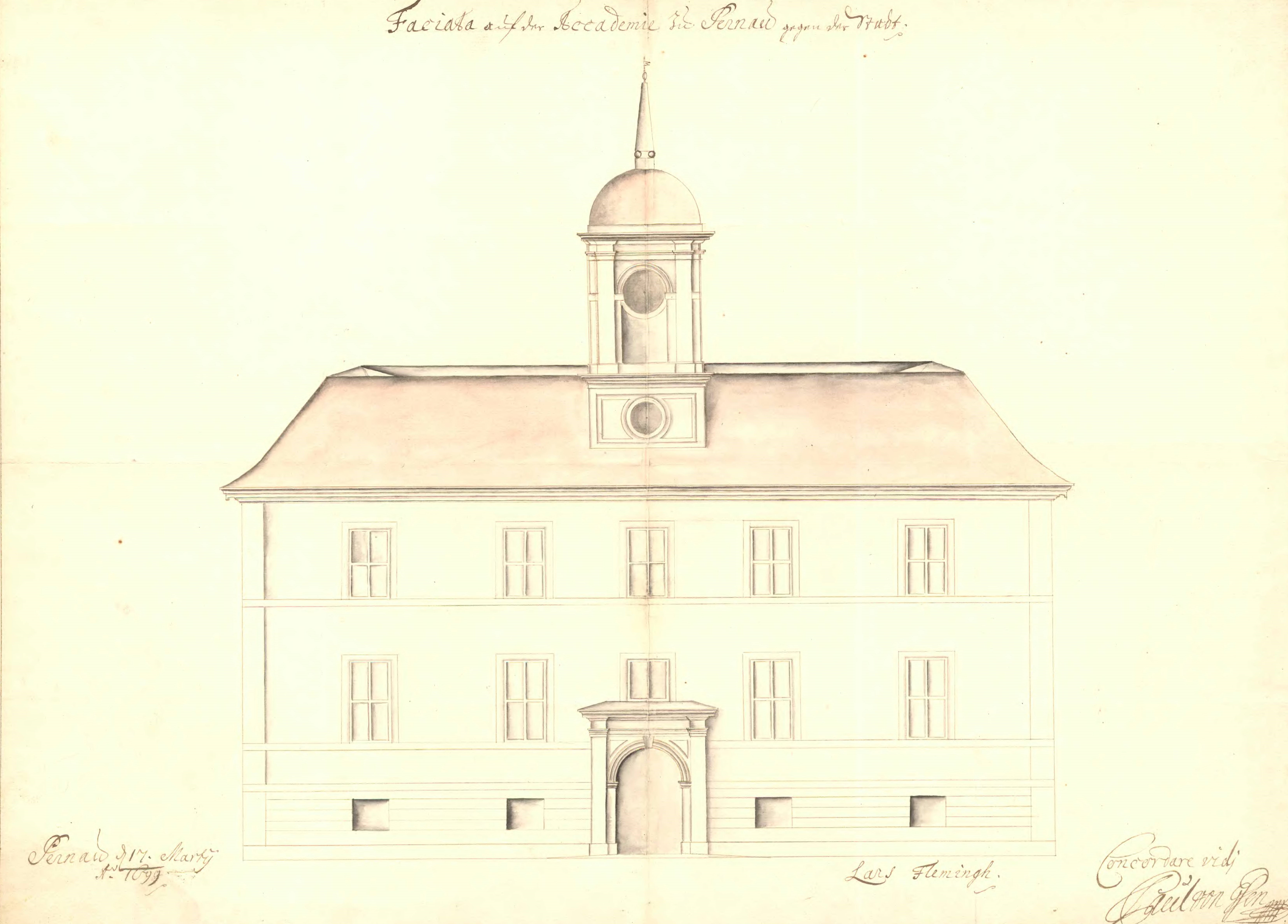 Academia Gustavo-Carolina hoone Pärnus.